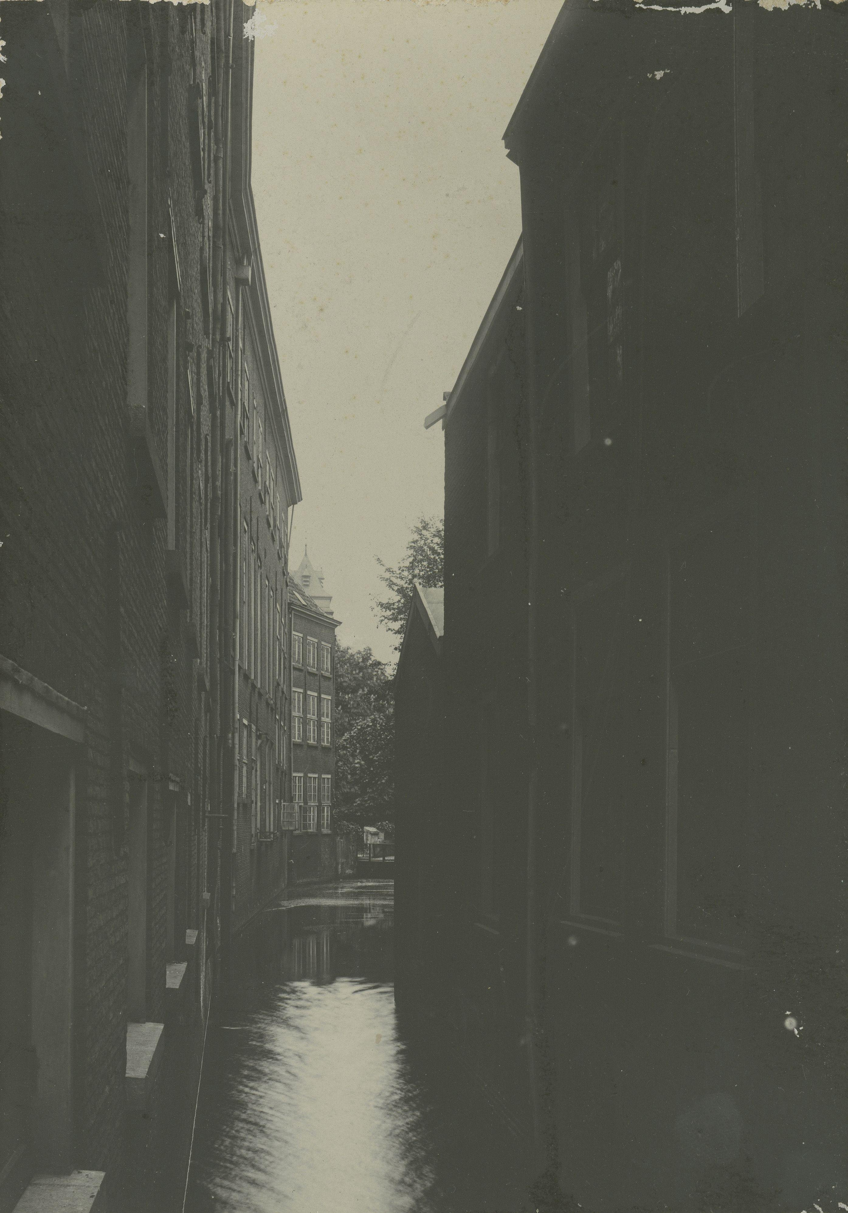 De Burchtgracht, nu na demping het Van der Sterrepad, gezien vanaf de Oude Rijn naar de Burcht.